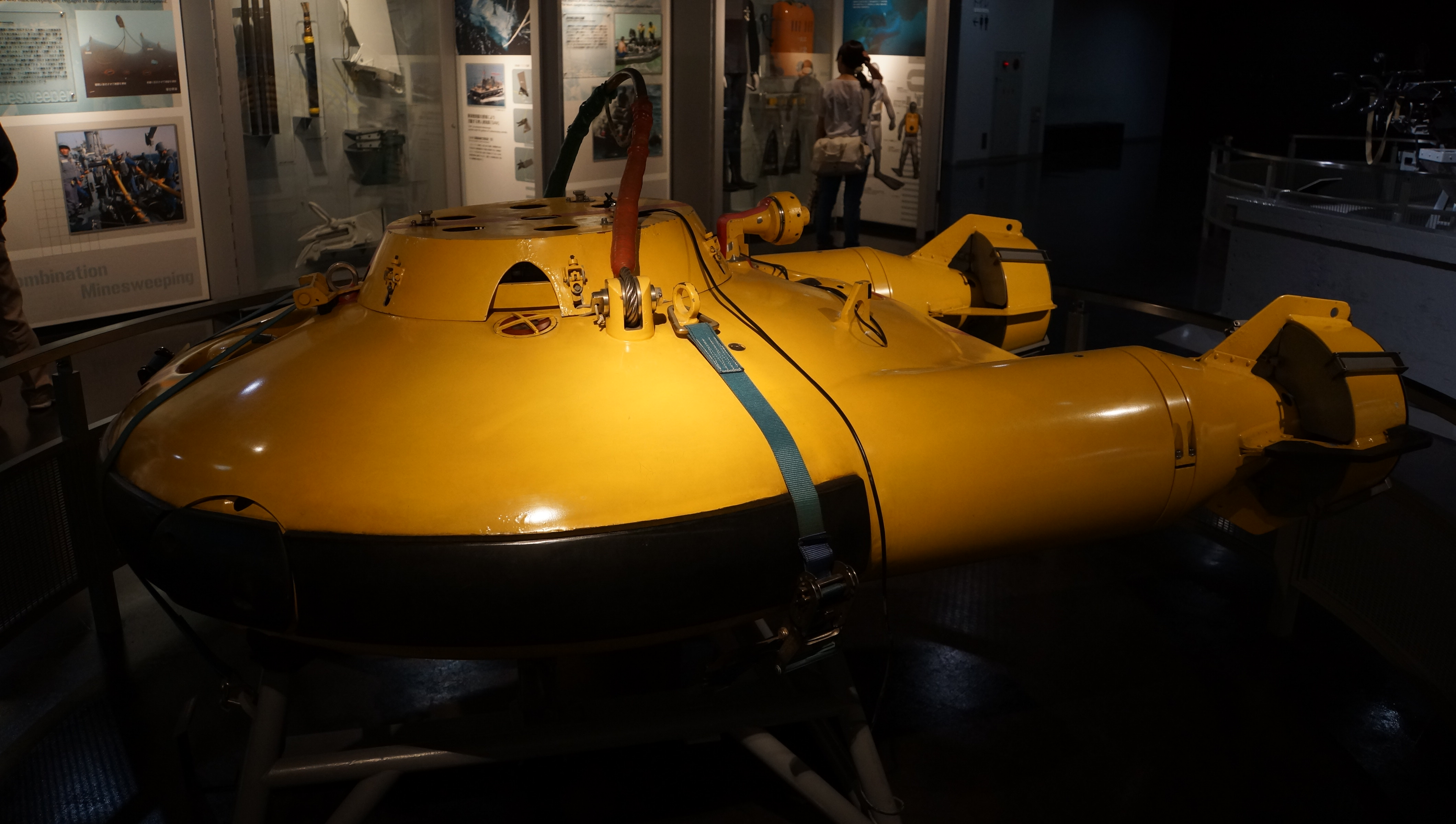 海上自衛隊 処分具S-4 左前面。 14年9月15日 海上自衛隊呉史料館内にて。